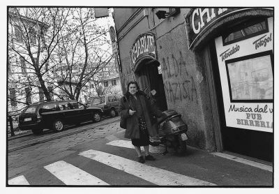 La poetessa Alda Merini mentre si reca al caffè Chimera di Milano, locale che frequentava abitualmente